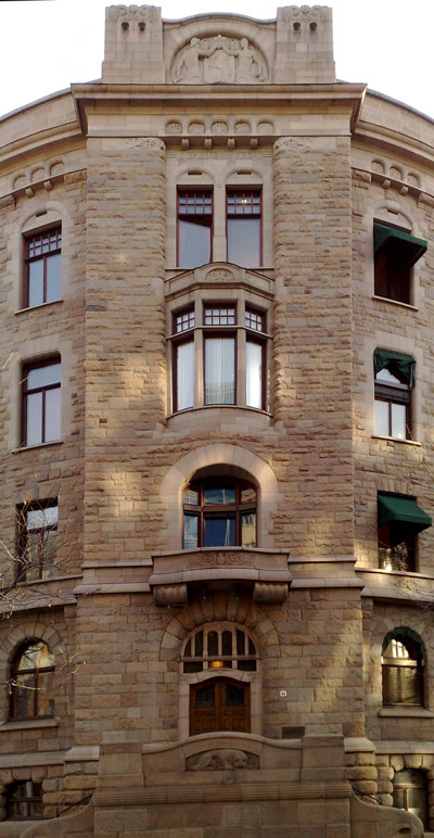 Finansdepartementet i Oslo, Norge. Norwegian Ministry of Finance